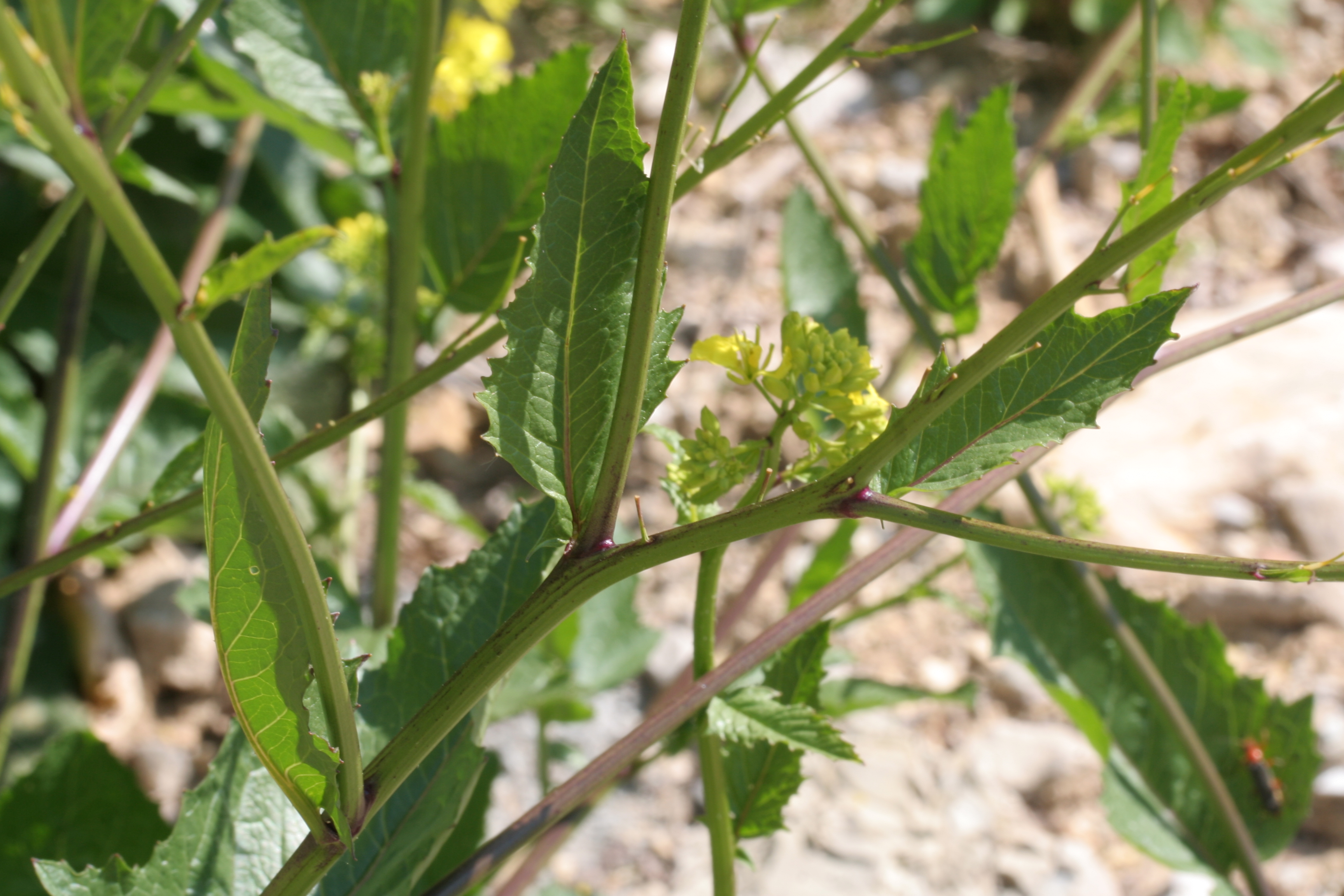 Erba di Santa barbara comune - Località : Pasa, Sedico (BL), 356 m s.l.m.